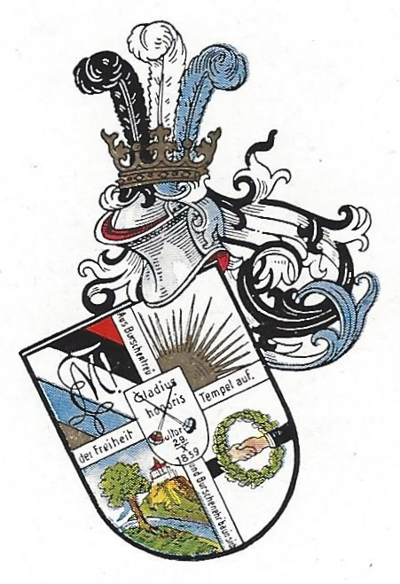 Wappen der Burschenschaft Moravia an der Deutschen Technischen Hochschule Brünn